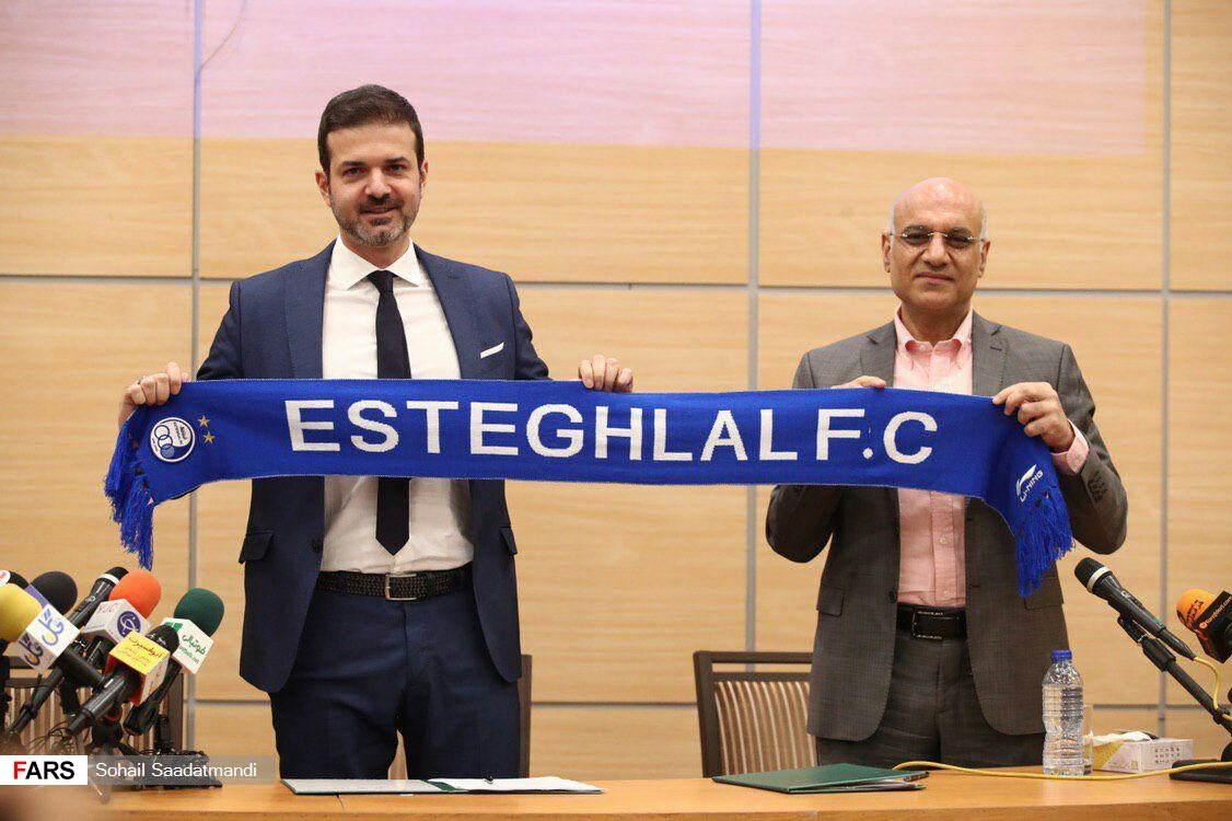 گزارش تصویری از مراسم معارفه و نشست خبری آندره‌آ استراماچونی در تیم استقلال